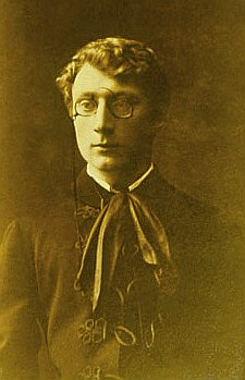 Czech poet Antonín Sova (1864-1928)